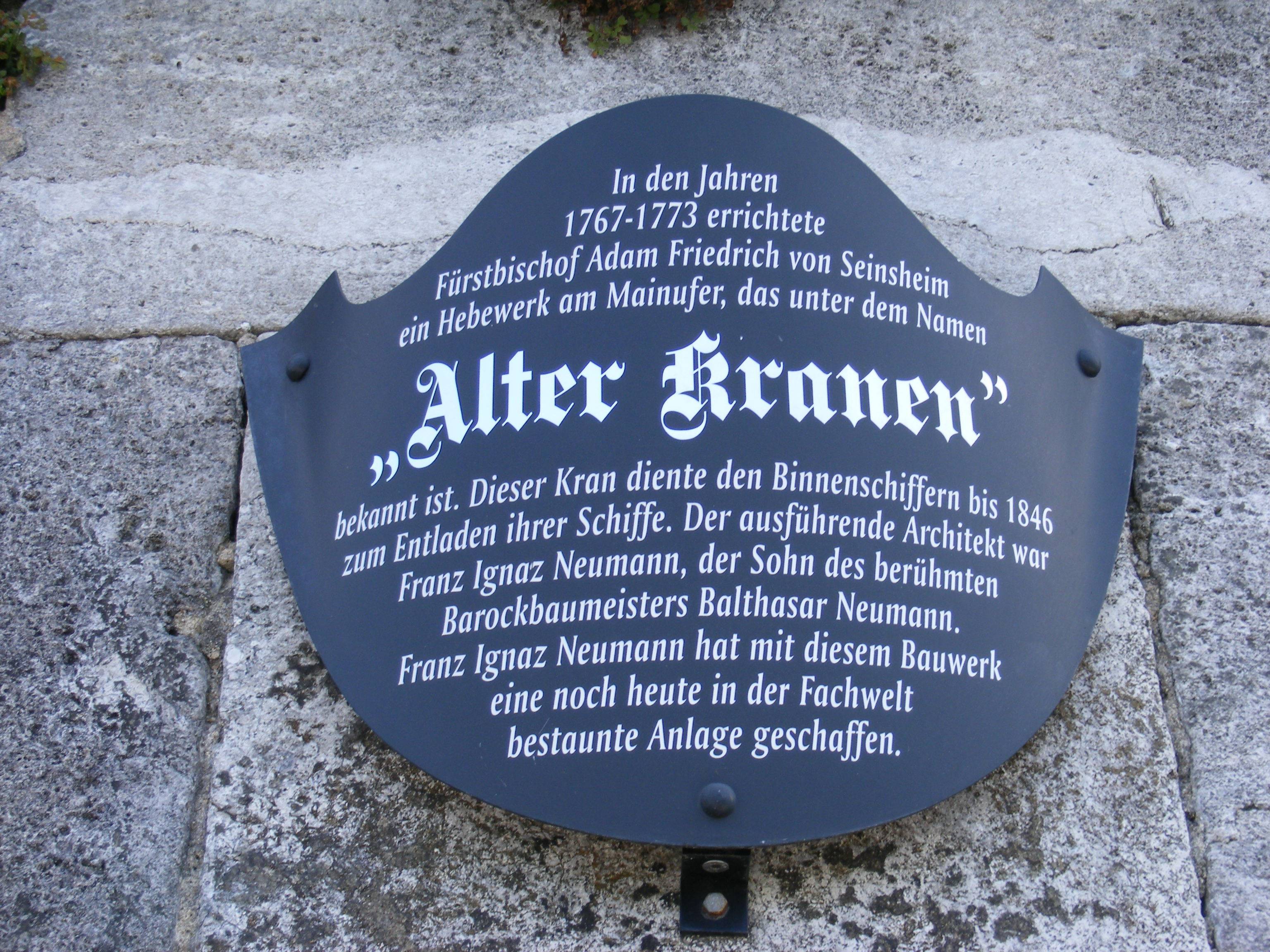 Würzburg - Alter Kranen (Schild).